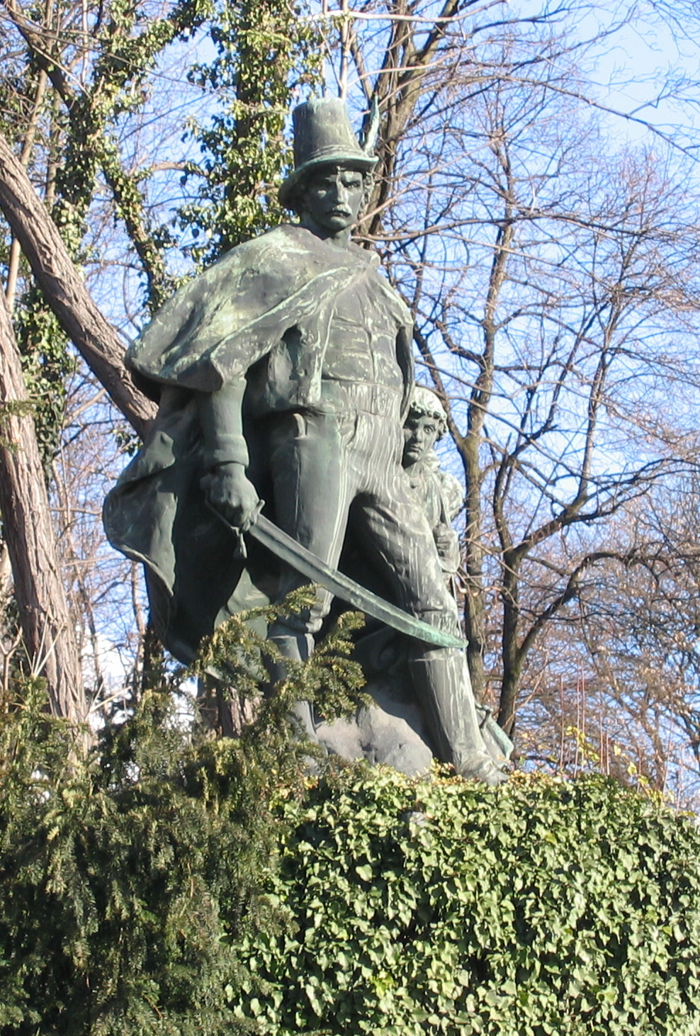 Josef-Speckbacher-Denkmal, Hall in Tirol This media shows the remarkable cultural object in the Austrian state of Tyrol listed by the Tyrolean Art Cadastre with the ID 70278. (on tirisMaps, pdf, more images on Commons)